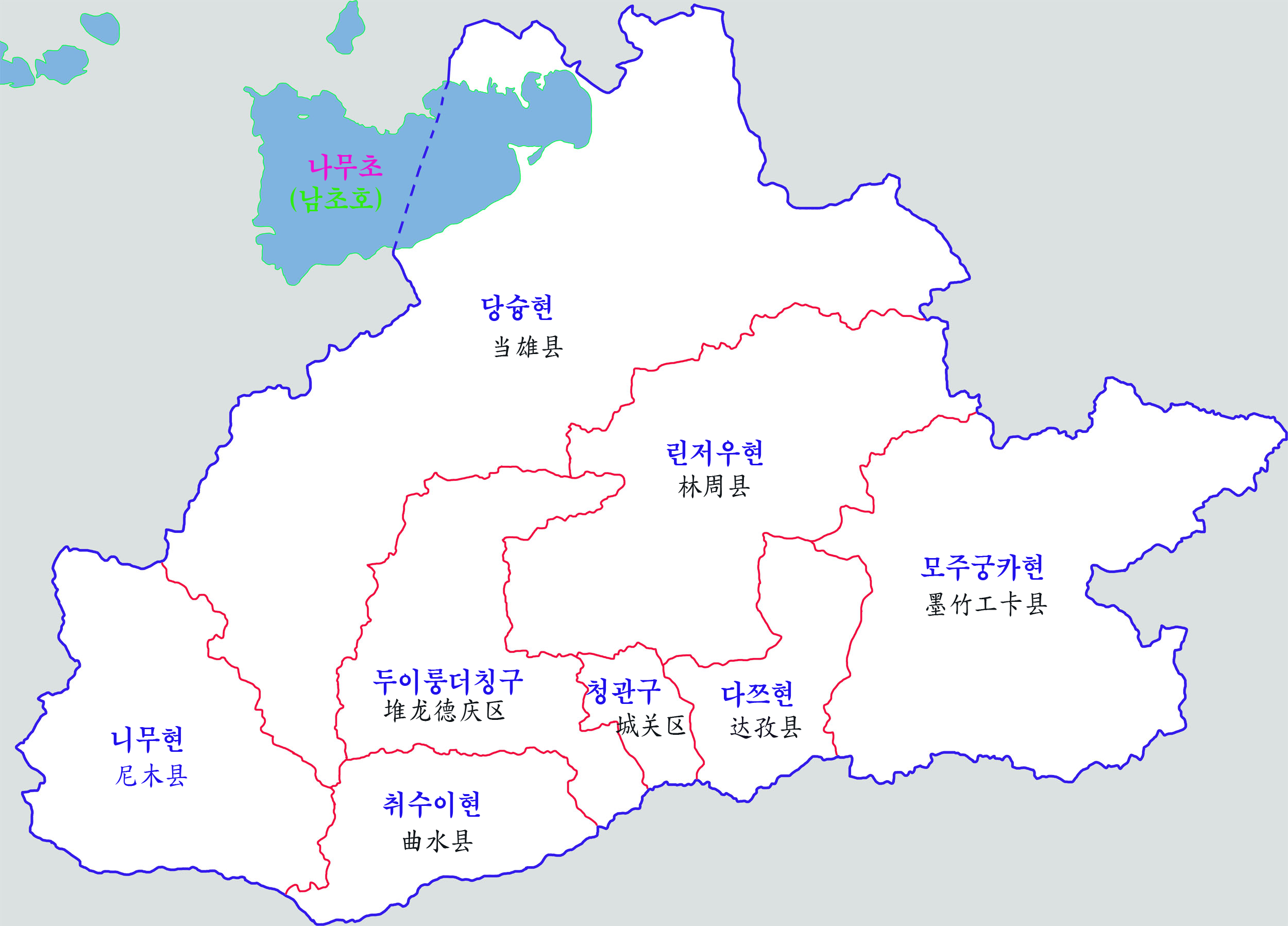 라싸시 행정구역